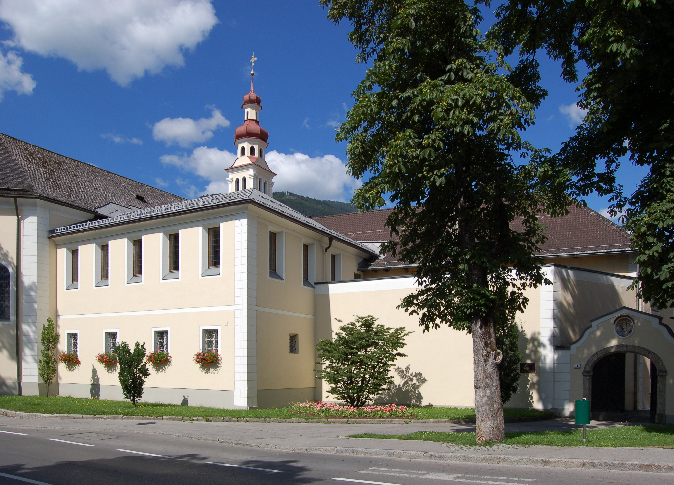 Das denkmalgeschützte Dominikanerinnenkloster Lienz in der Pfarrgasse 1.